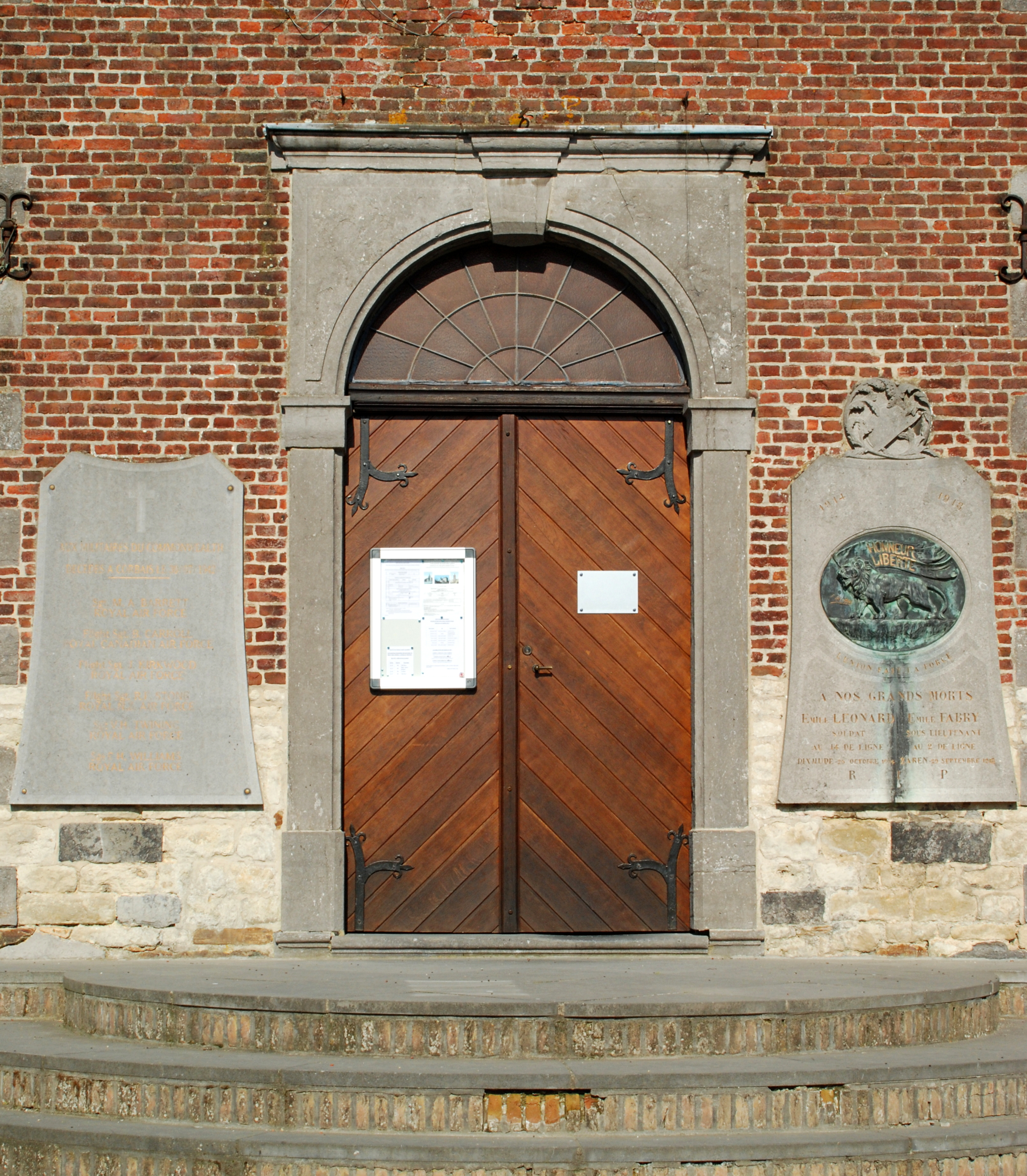 Belgique - Brabant wallon - Mont-Saint-Guibert - Église Saint-Pierre de Corbais (classique, 1773)